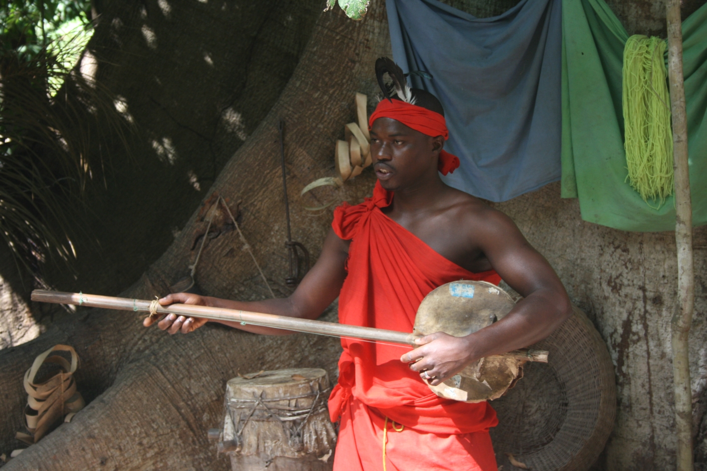 Guide du musée en plein air consacré à la culture des Diolas à Boucotte en Casamance (Sénégal) jouant de l’écontine, instrument de musique traditionnel